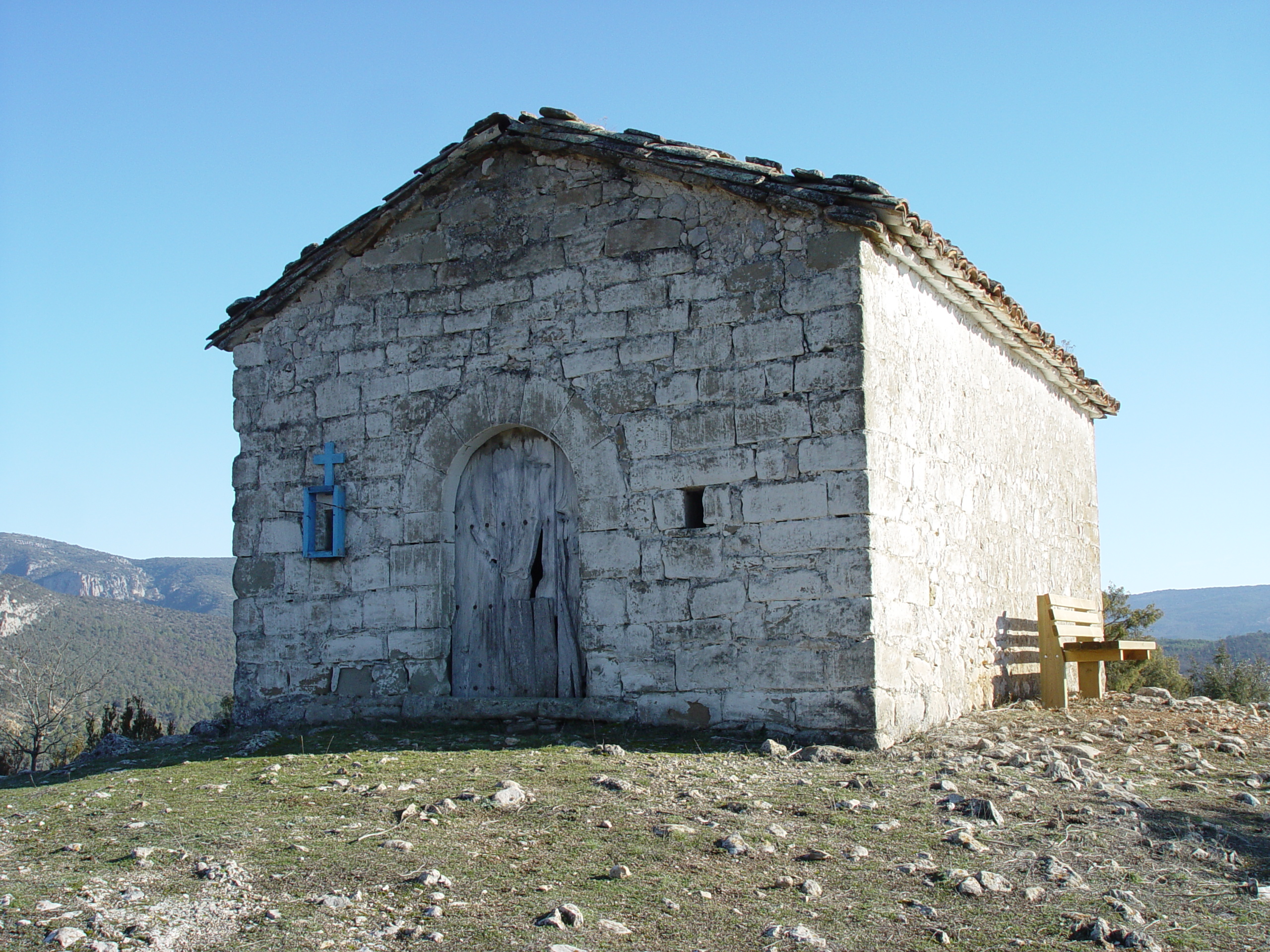 Ermita de Sant Marc de Finestres